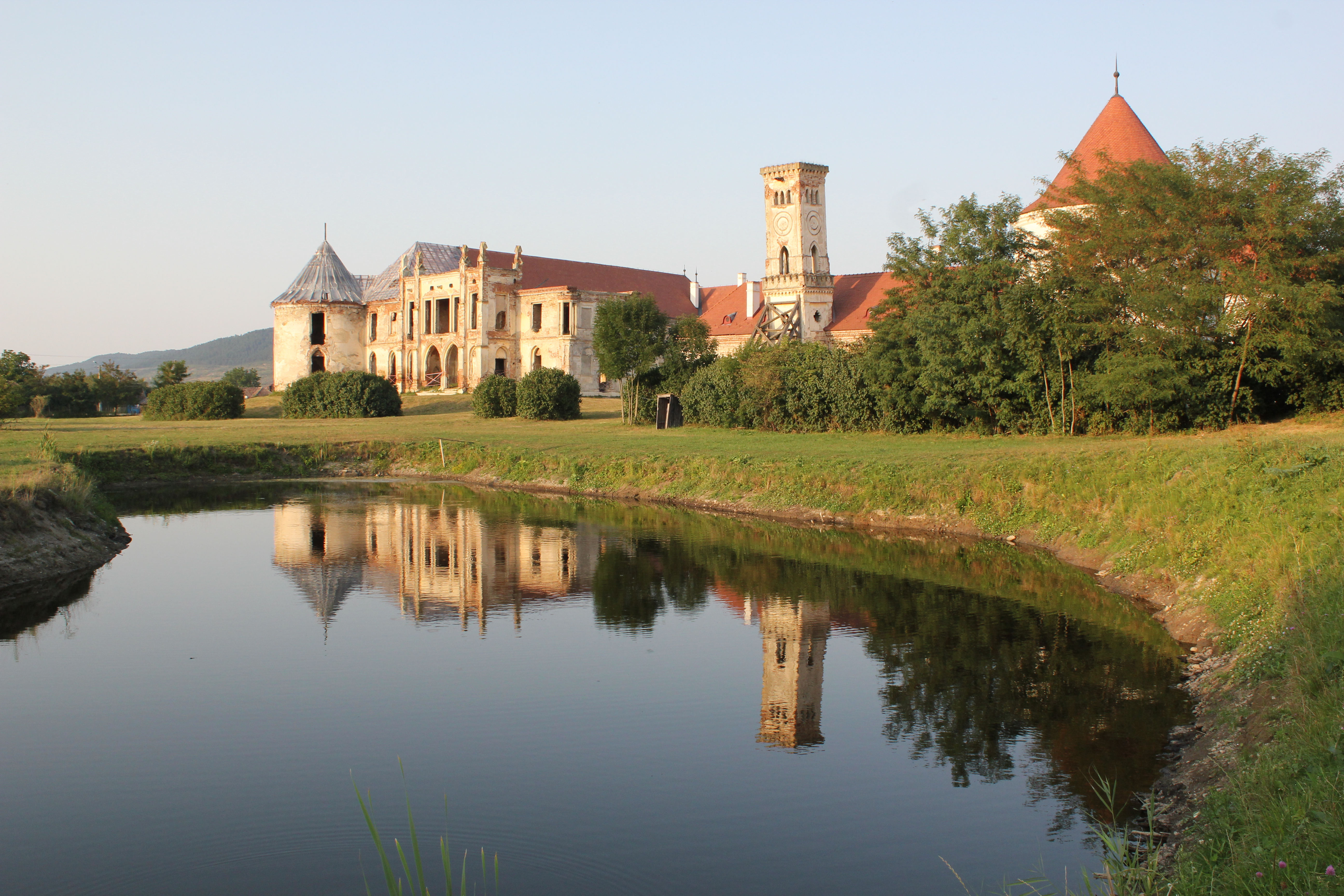 Fotografia surprinde clădirea principală a castelului Bánffy din Bonțida și reflexia lui prin lacul din propriul parc. Puțin la drepta de axa verticală a fotografiei se înalță turnul cu ceas, iar spre colțul din dreapta sus răsare din tufișuri acoperișul bastionului din sud-vest. Pe partea stângă a fotografiei clădirea se termină prin bastionul din nord-vest.